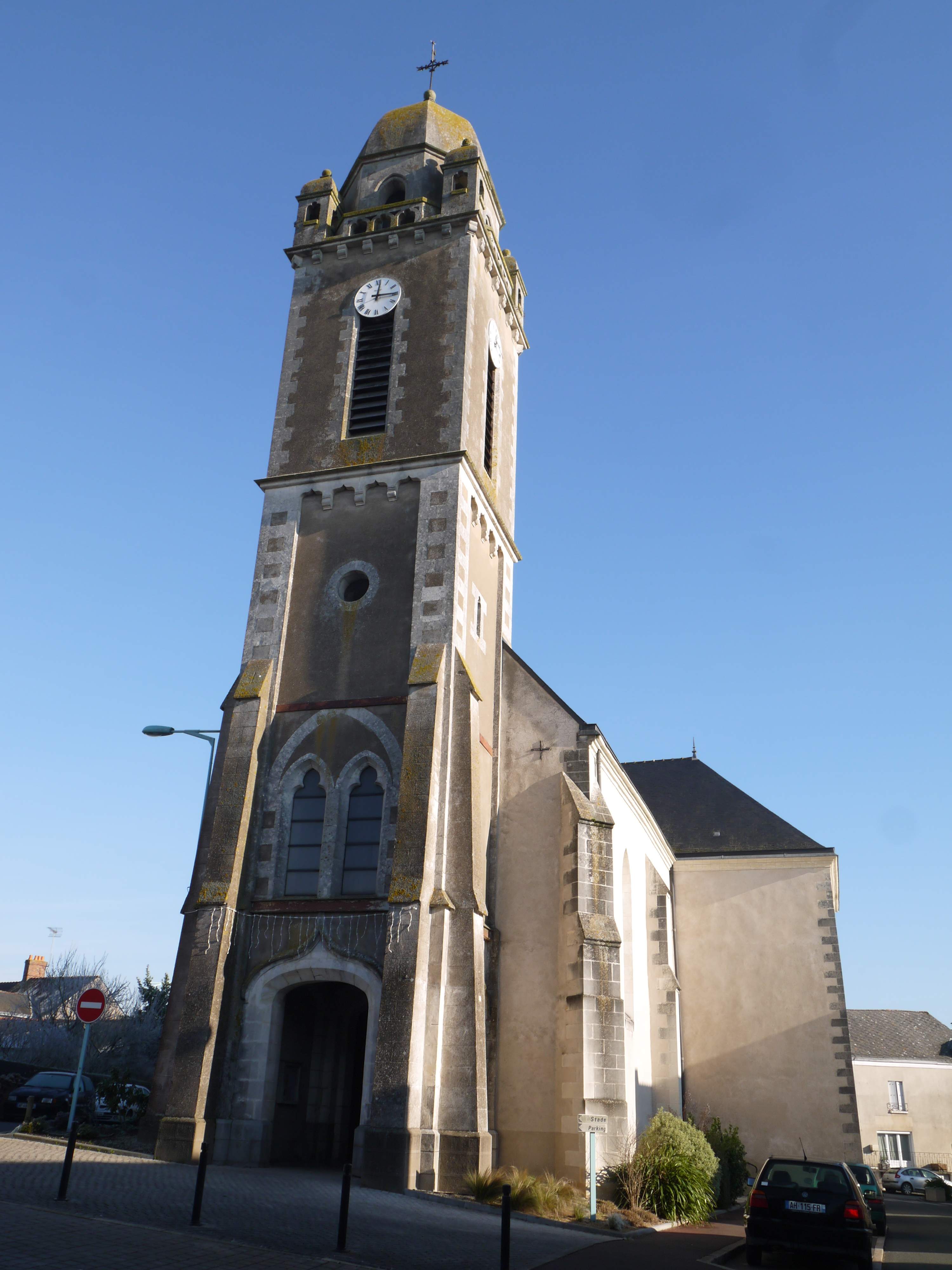 Eglise d'Anetz vue 3